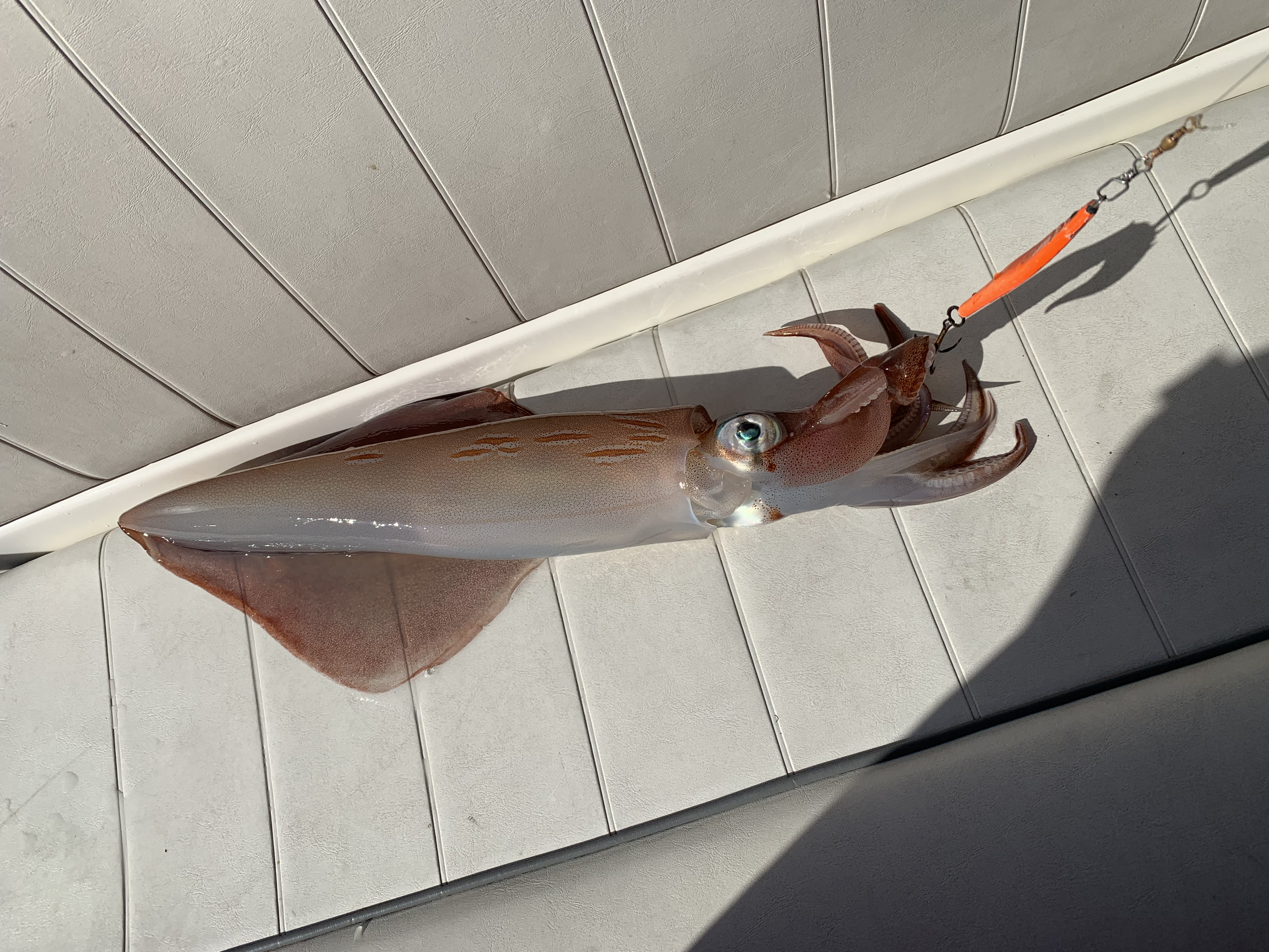 Loligo forbesi, gefangen im Geirangerfjord